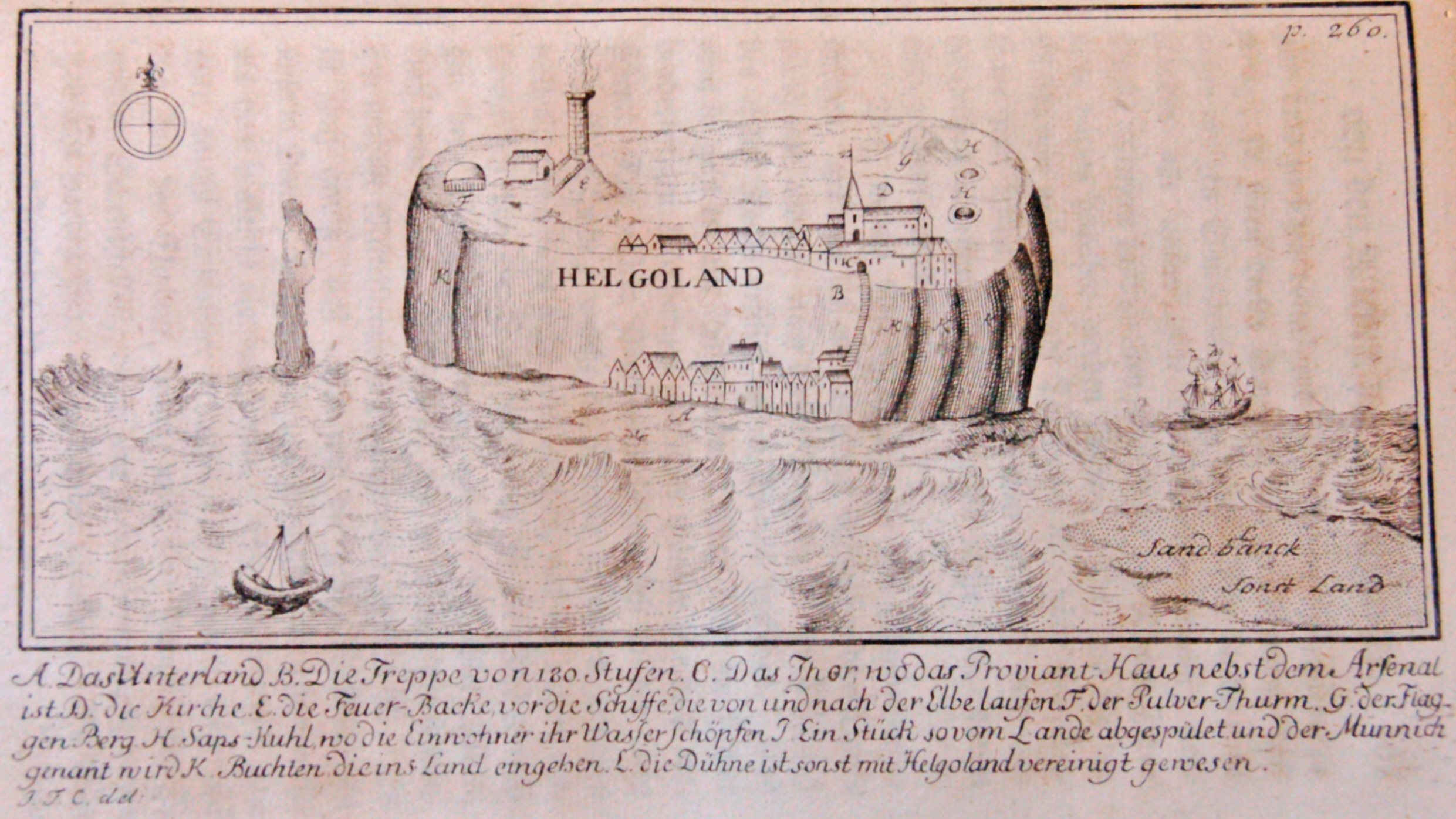 Die Insel Helgoland, Zeichnung von Johann Friedrich Camerer (1720-1792) um 1758